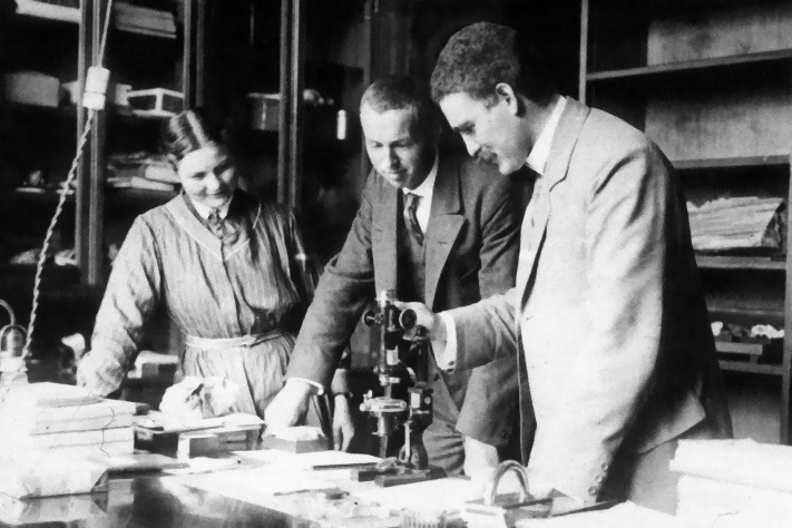 Гольдшмидт, Виктор Мориц (Victor Moritz Goldschmidt)